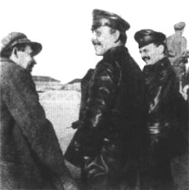 Лев Троцкий (справа) и Демьян Бедный (в центре) под Казанью. 1918